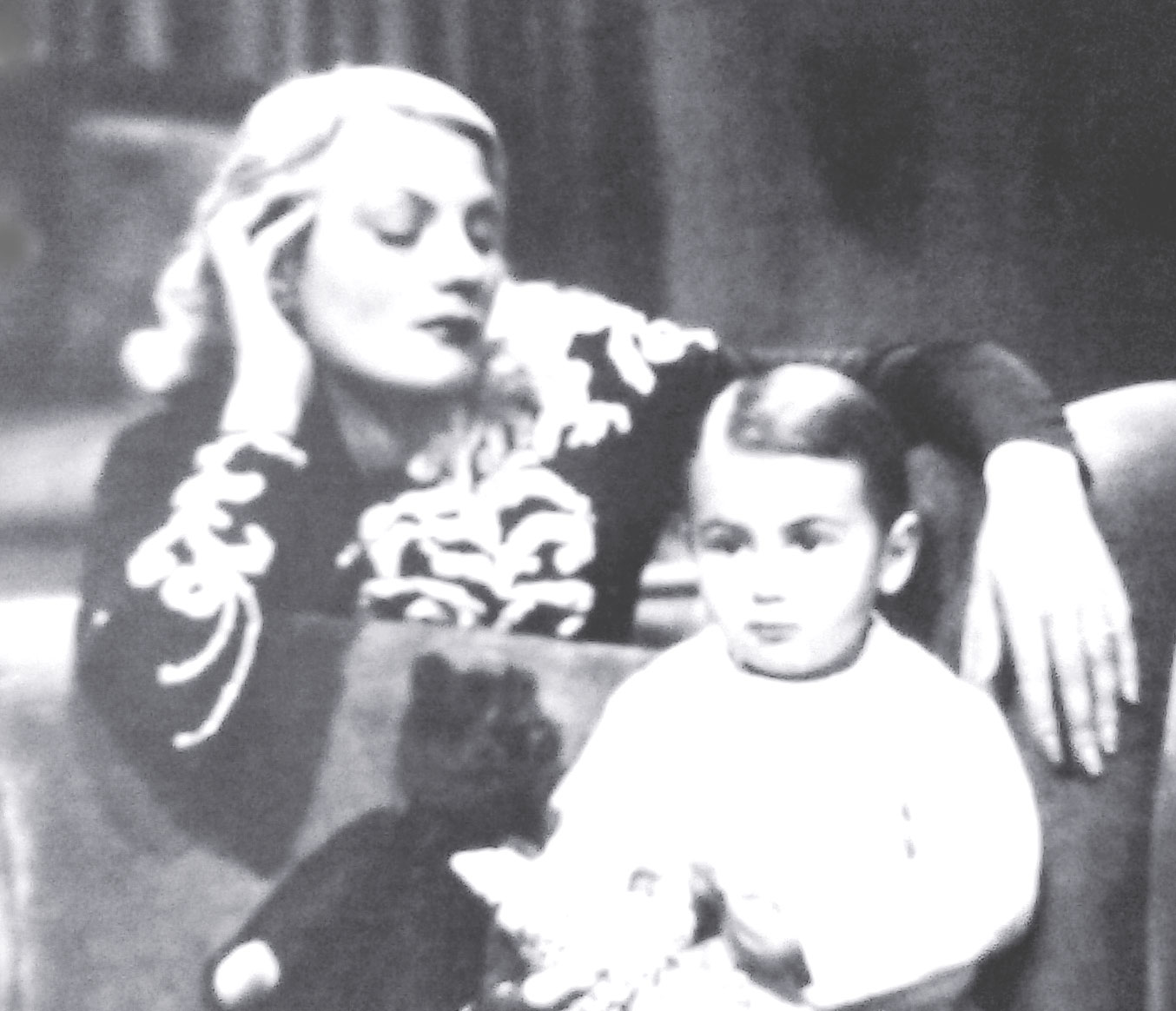 Isa Miranda in "E' caduta una donna" /Guarini, 1941)